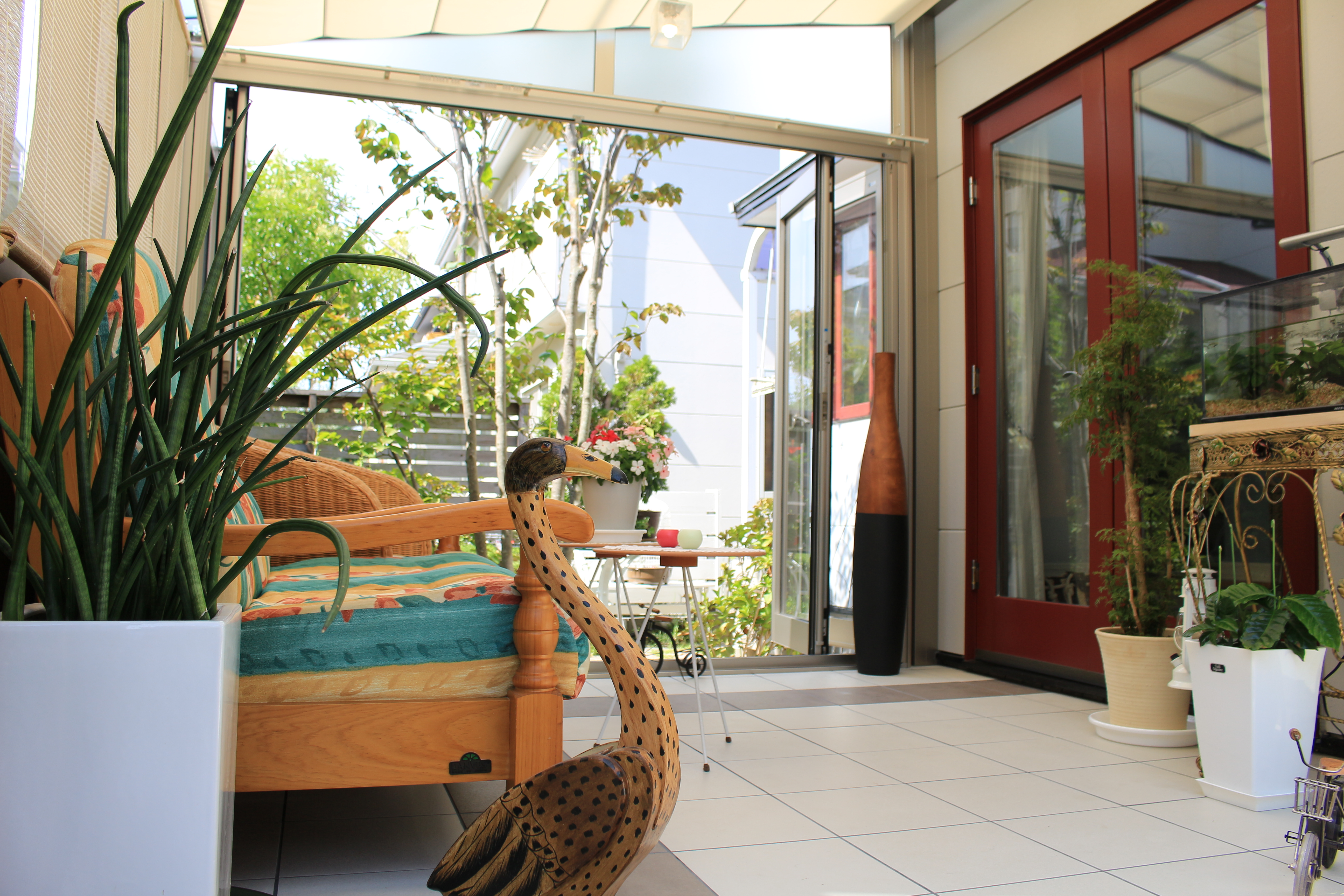 Outdoor living アウトドアリビング設置例 contractor.： Himawari Life Co., Ltd.（ひまわりライフ）